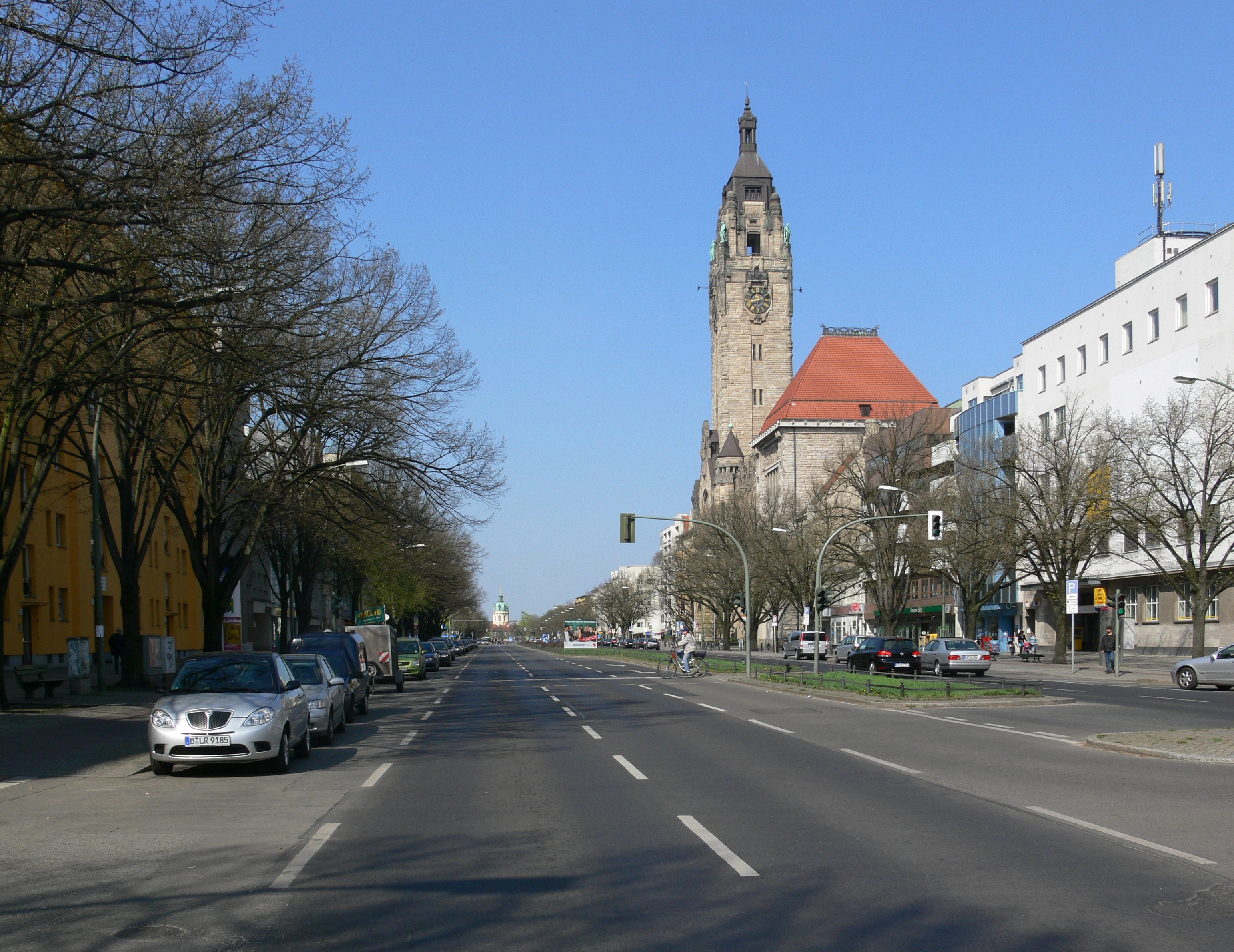 Berlin-Charlottenburg, Otto-Suhr-Allee (Blick nach Nordwesten) mit Rathaus Charlottenburg